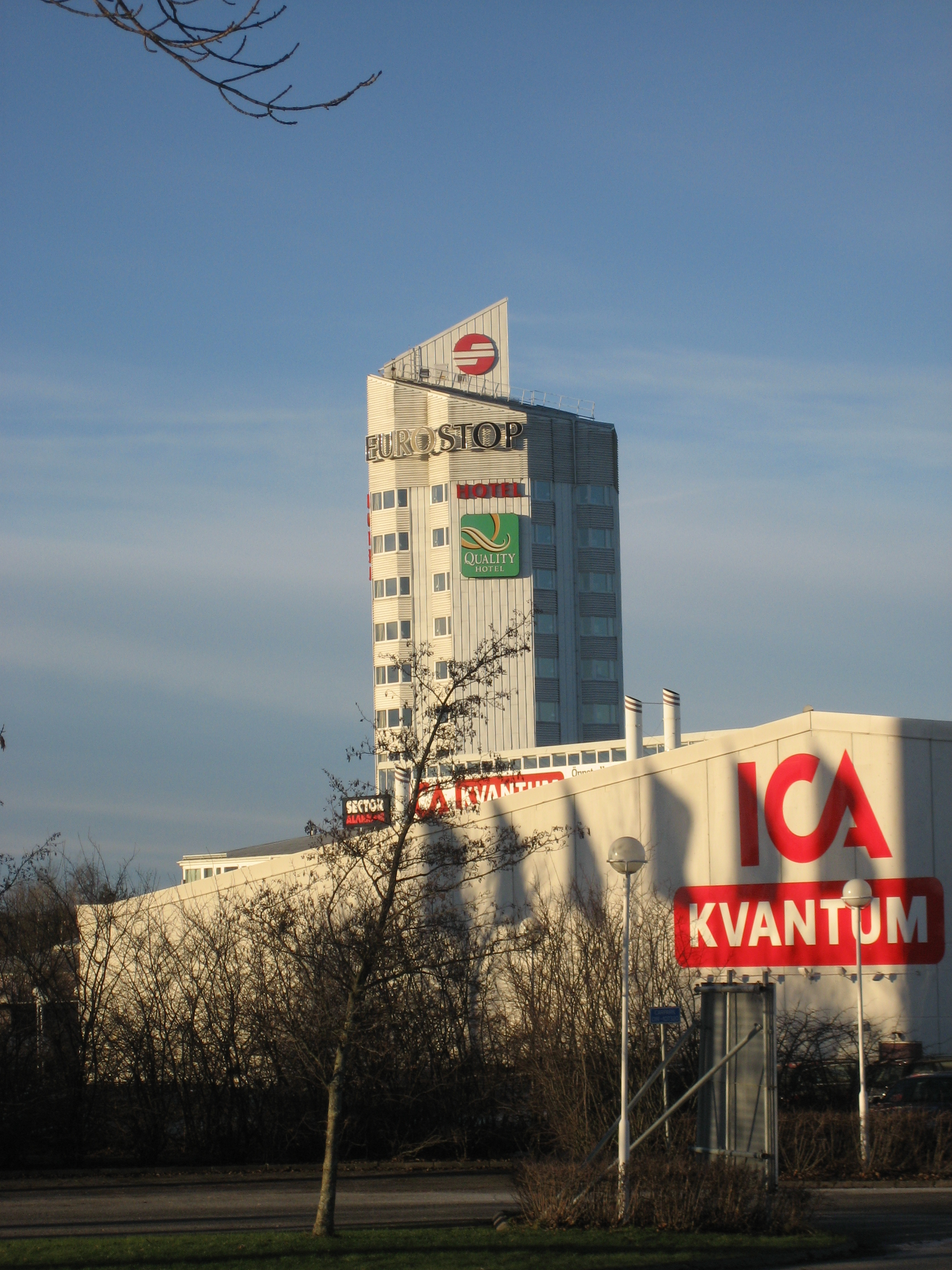 Eurostop truck stop in Örebro, Sweden